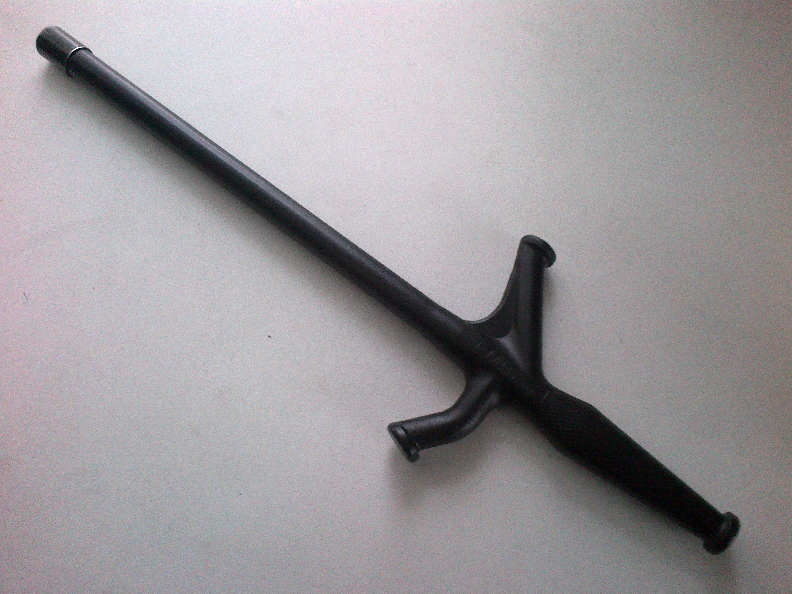 Pałka EMS. Oryginalna nazwa Baton Safety Holster (BSH) firmy RRB Systems (USA). Stosowana przez Policję w USA i Niemczech. W Polsce używana przez Straż Ochrony Kolei.